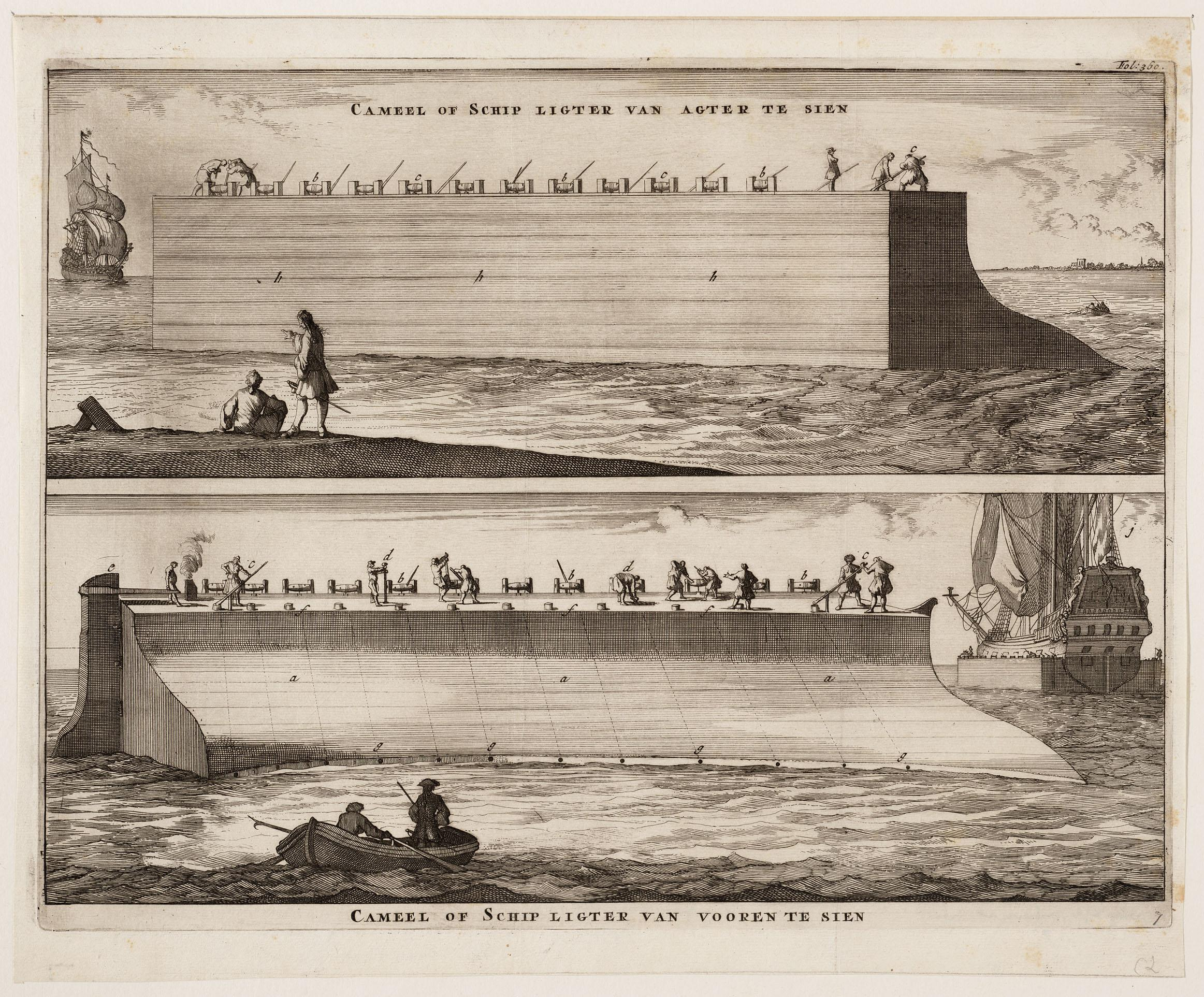 Cameel of schip ligter van agter te sien, cameel of schip ligter van vooren te sien